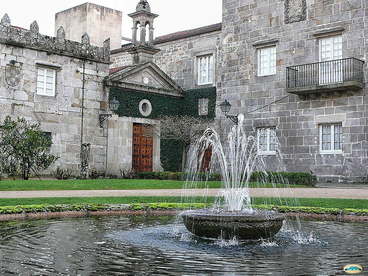 Vigo-Castrelos38